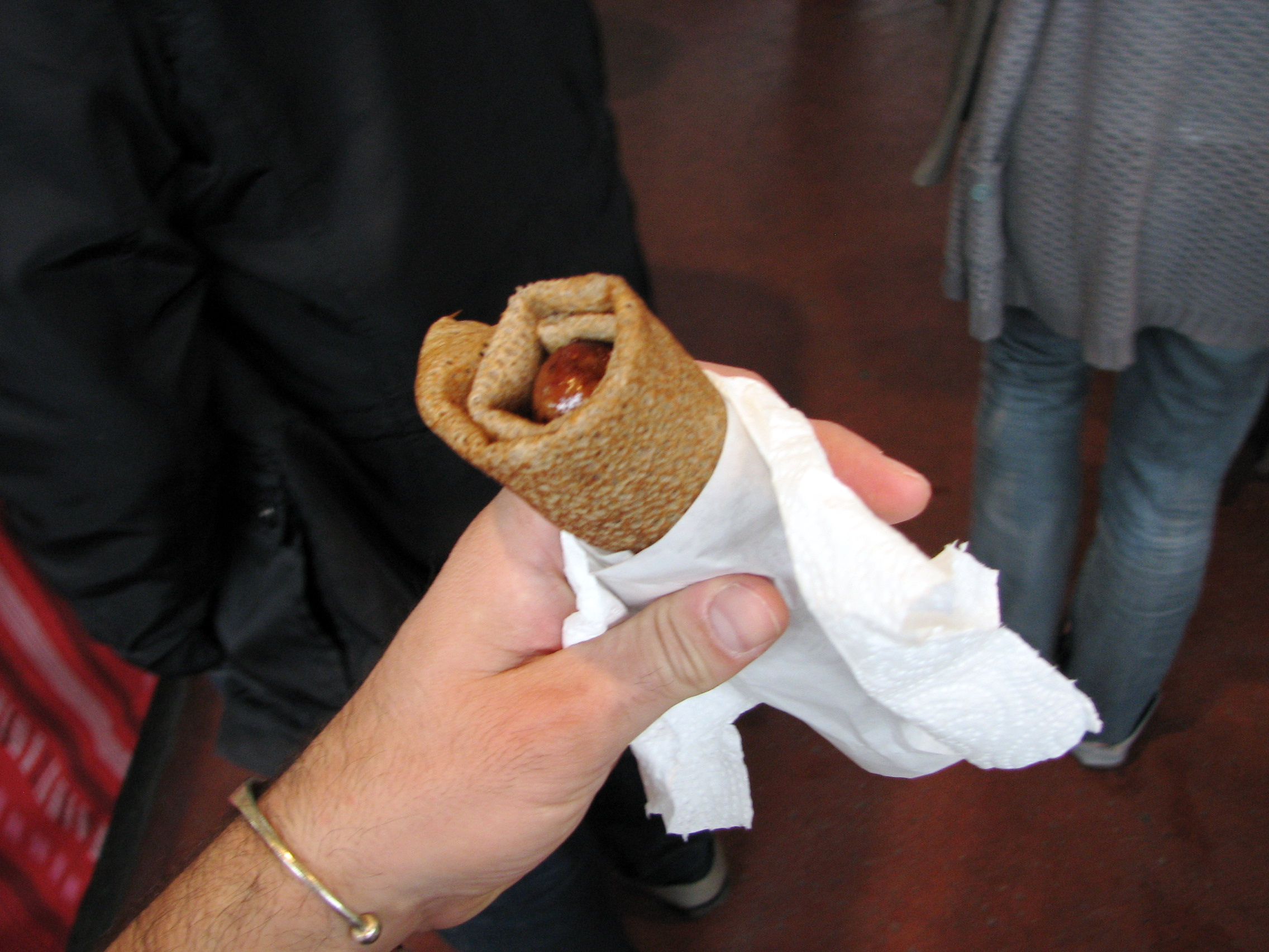 La galette saucisse de Rennes